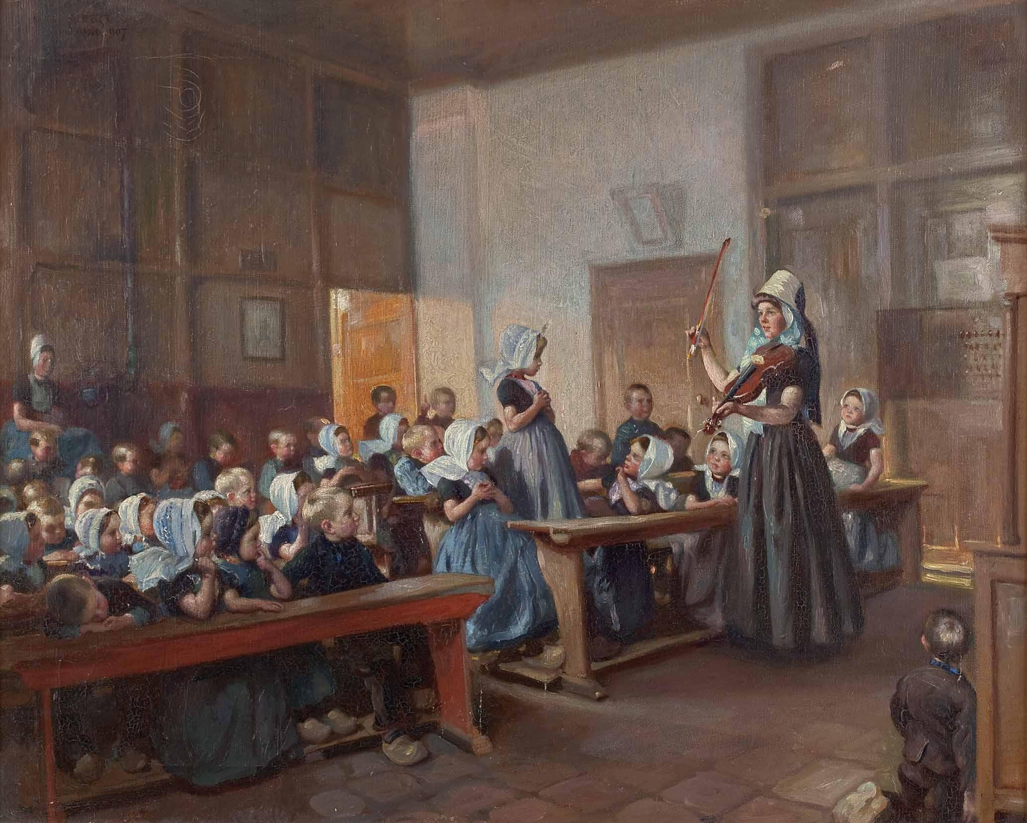 "Gesangsstunde in der Kinderschule in Holland" oben links signiert und datiert: Max Silbert Holland 1907, Öl auf Leinwand, ca. 66 x 80 cm